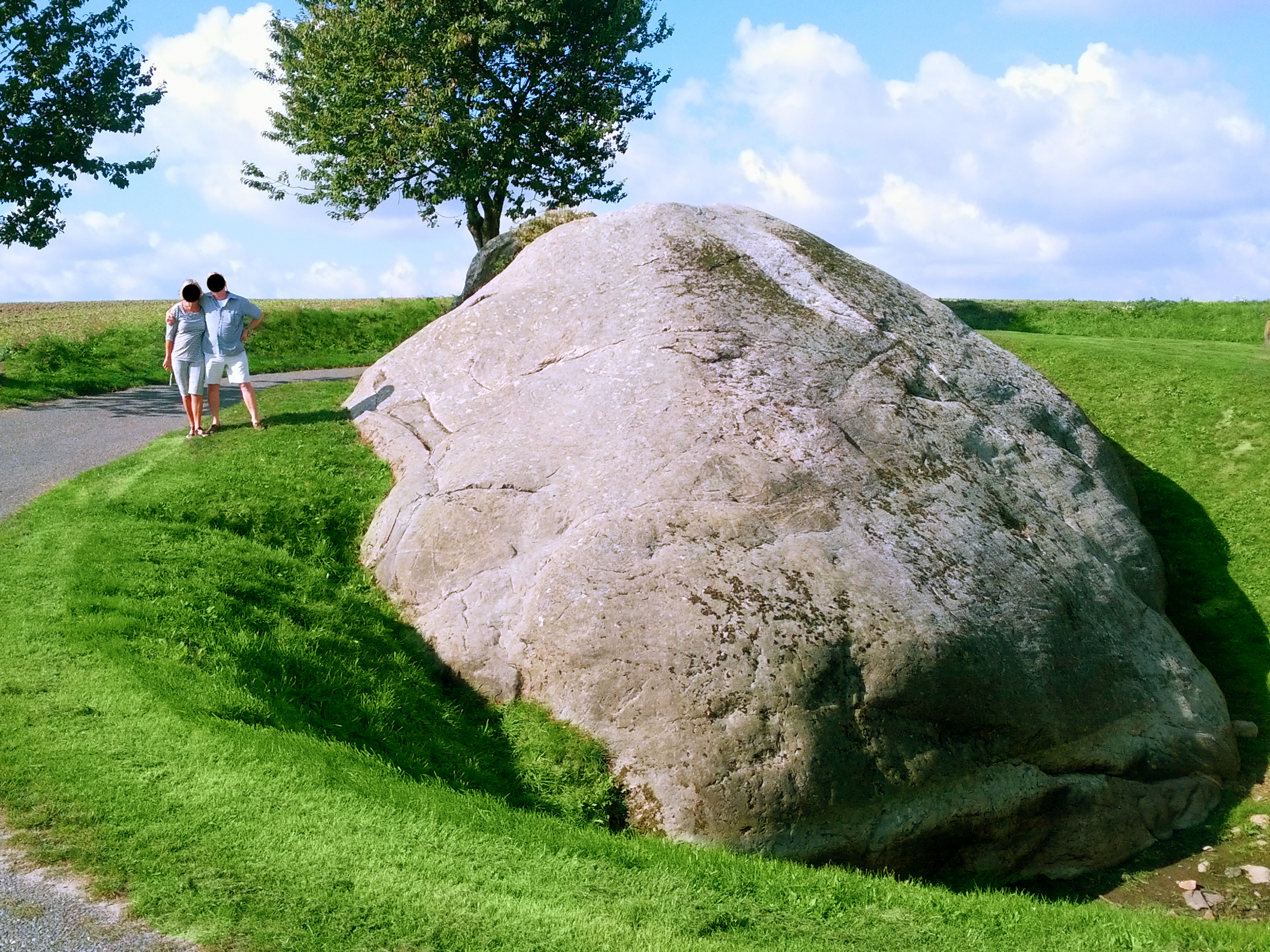 Der Dammestenen - mit etwa 10 Metern Höhe und 1000 Tonnen Masse Dänemarks größter Findling